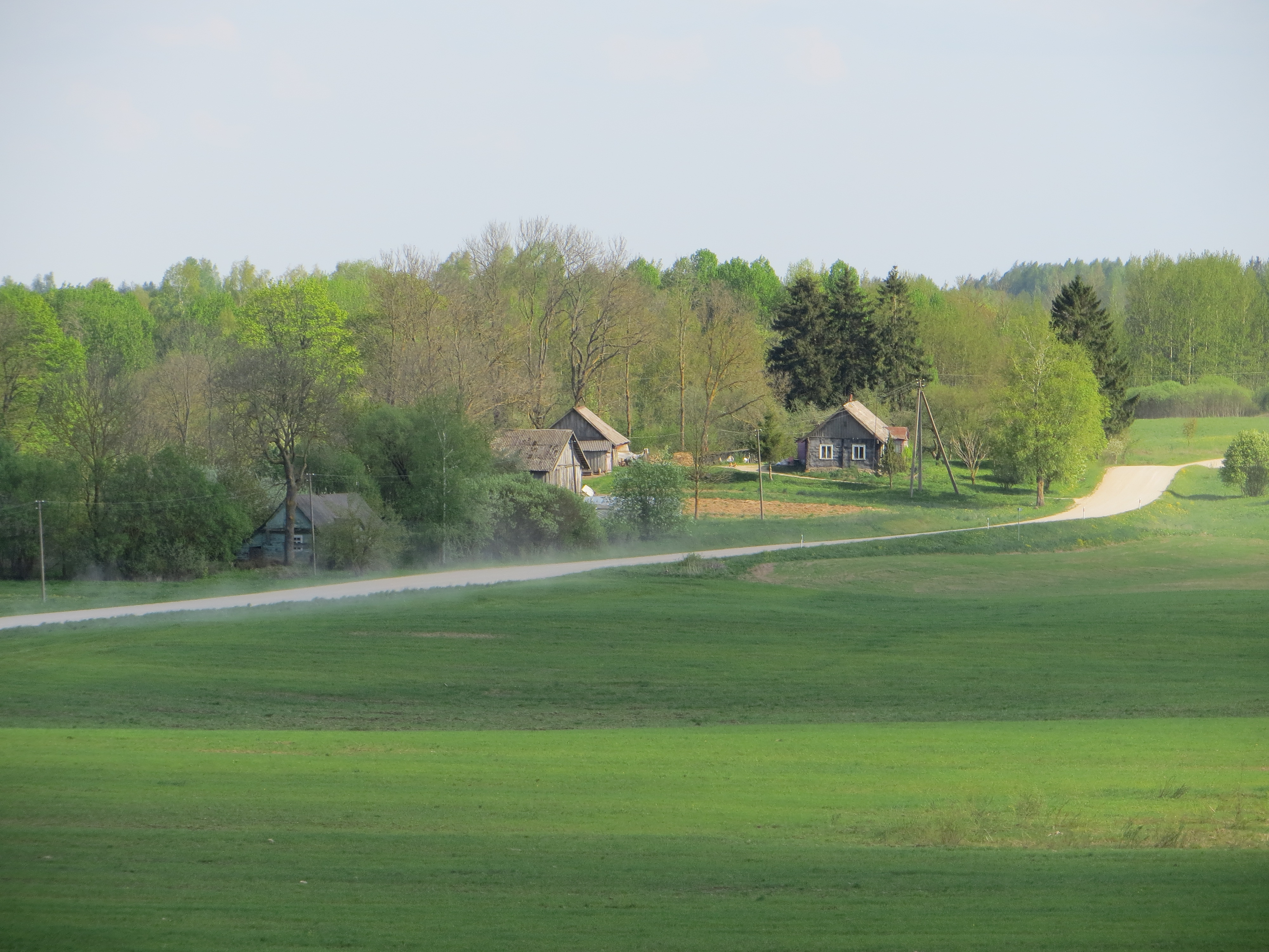 Kurklių sen., Lithuania